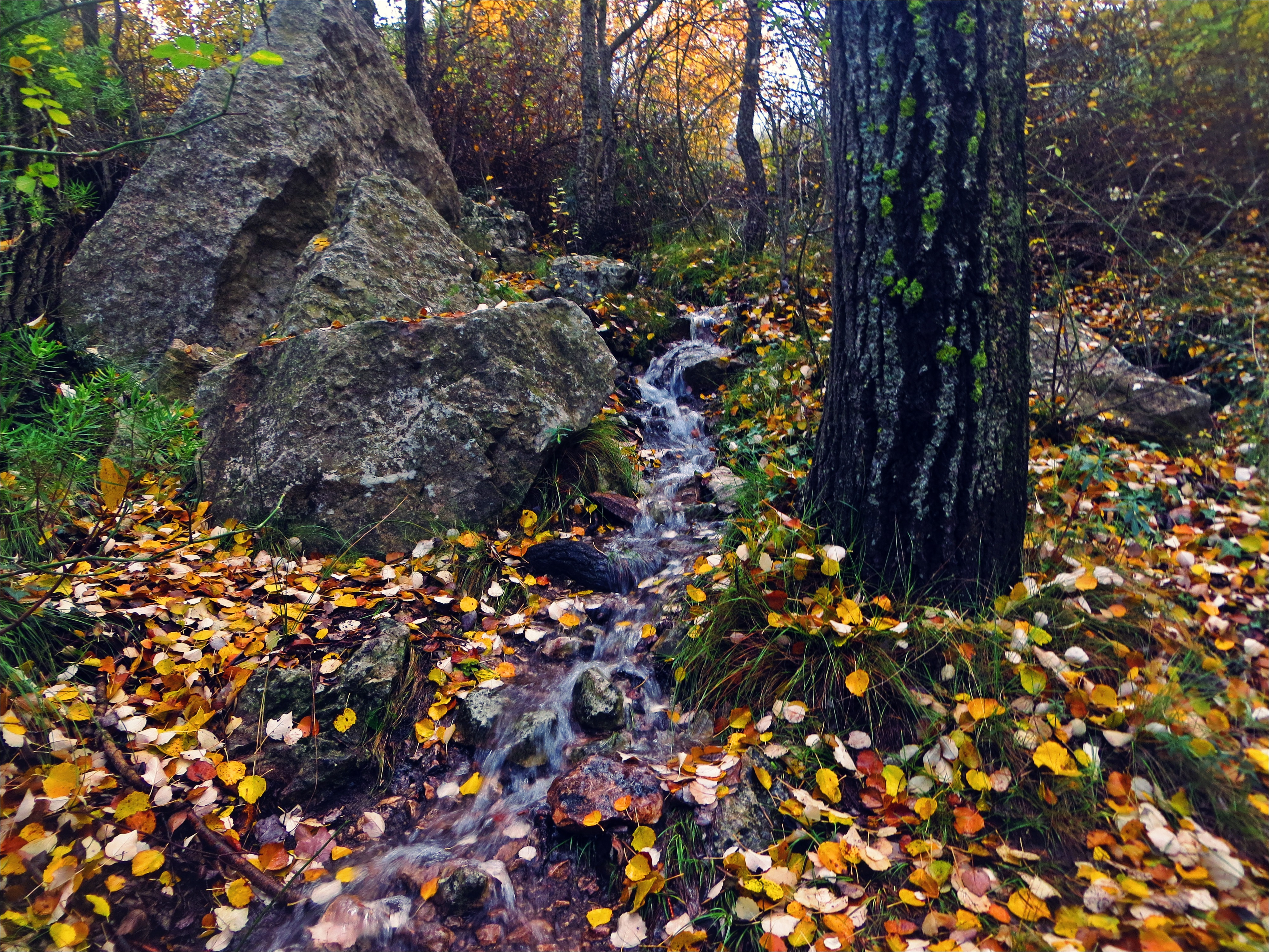 Arroyo junto a la Font de Partagat.